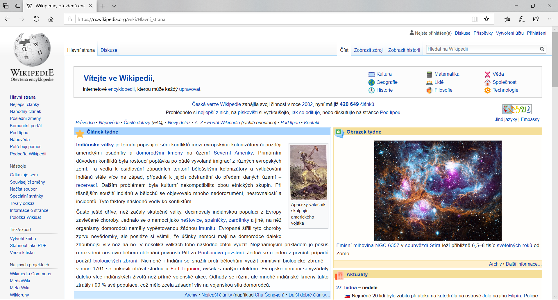 Screenshot Microsoft Edge 44